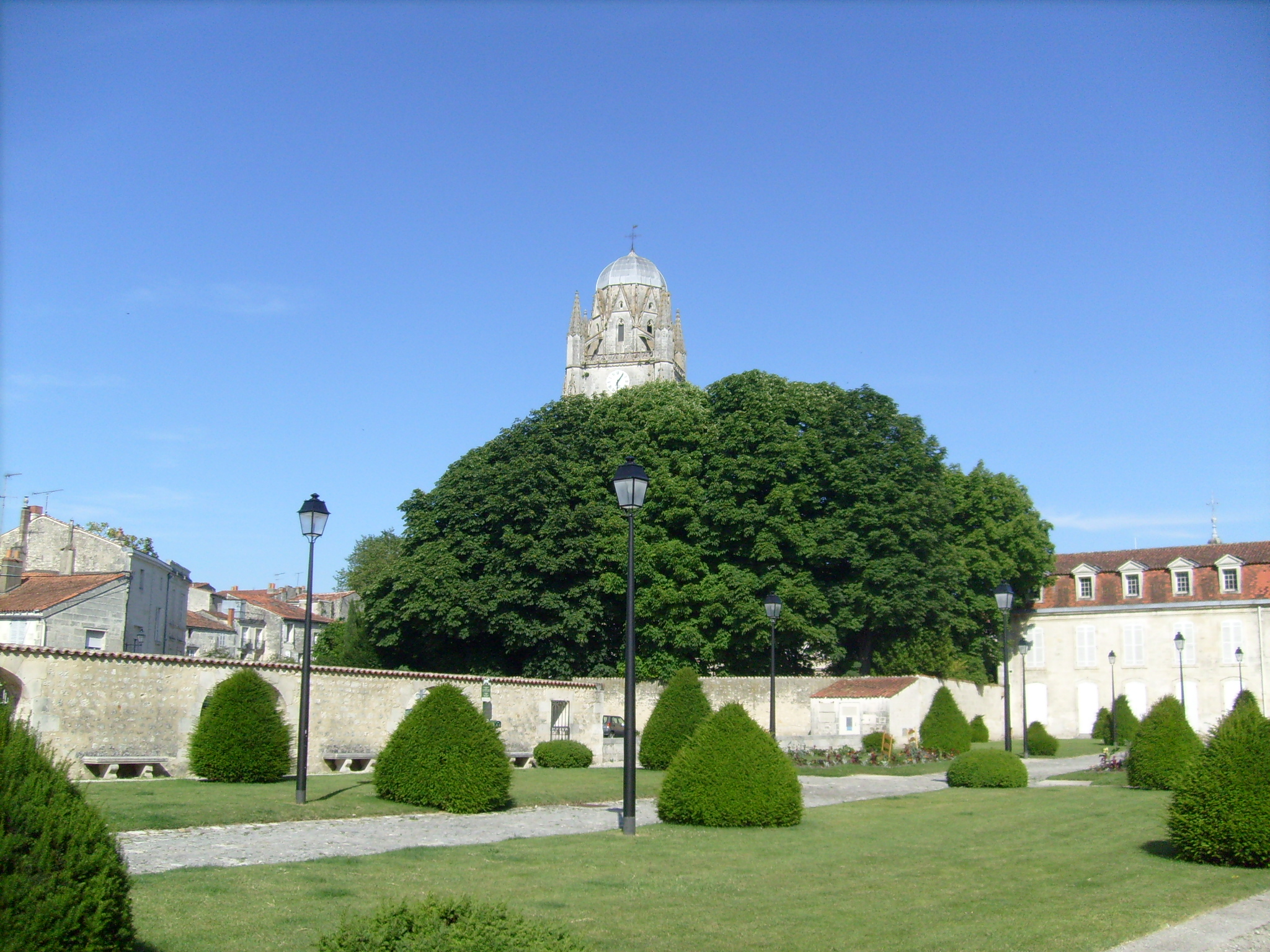 Saintes : Le square Maudet